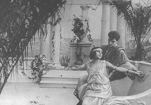 Кадр из фильма «Жизнь за жизнь»